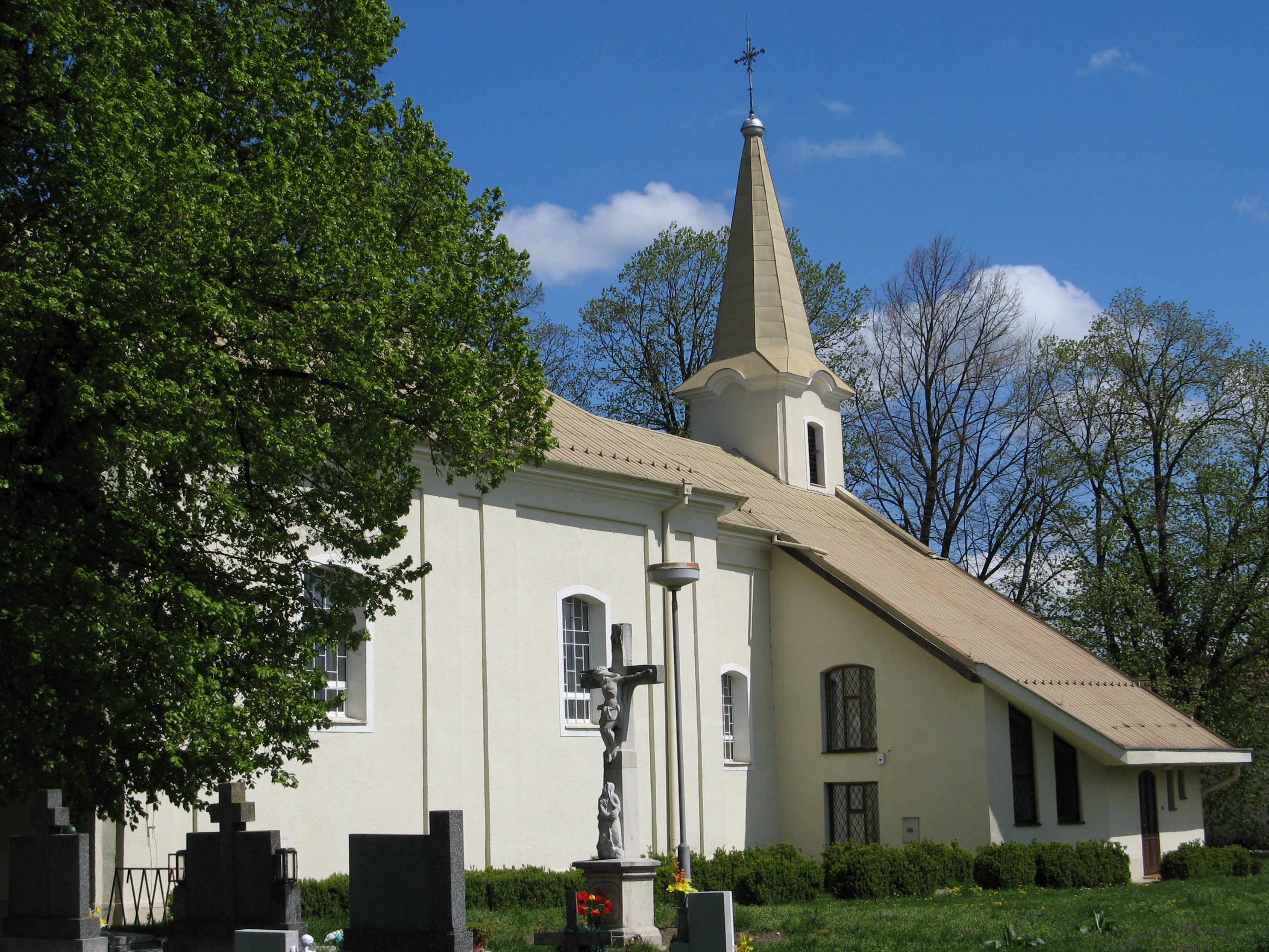 Dubovany - kostol sv. Michala archanjela